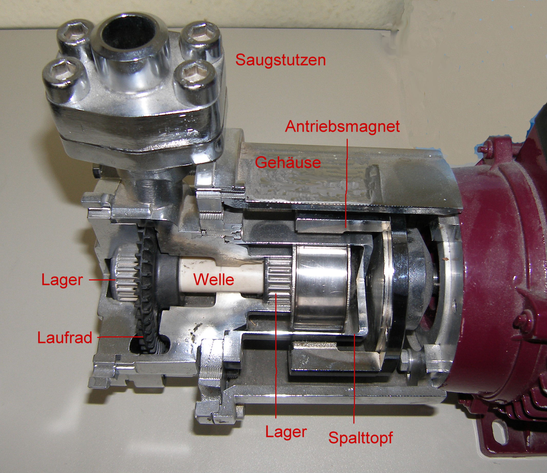 Ausschnitt einer Peripheralradpumpe